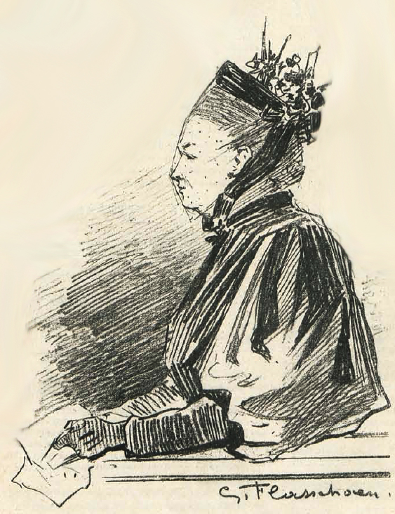 G. Flasschoen - 12 janvier 1895 - L'Illustration